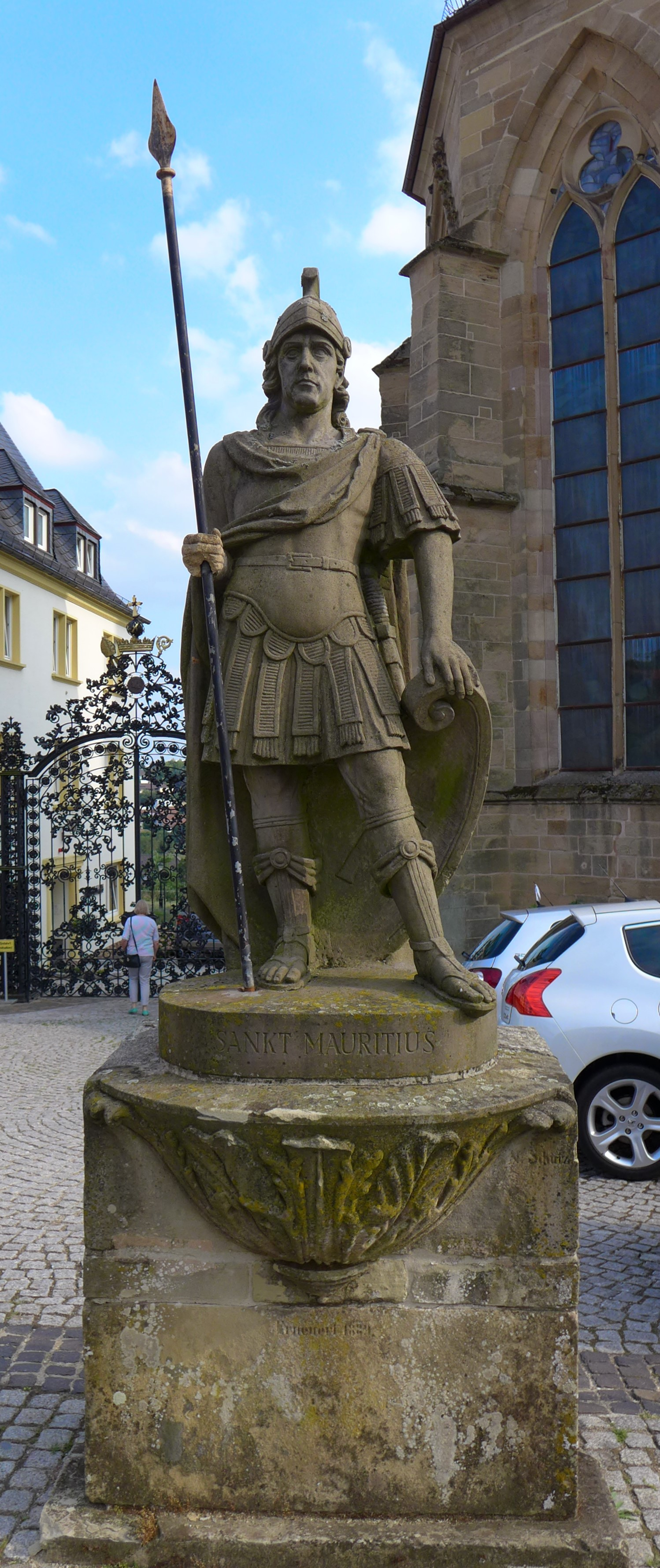 Benediktinerabtei St. Mauritius (Tholey), Statue des heiligen Mauritius